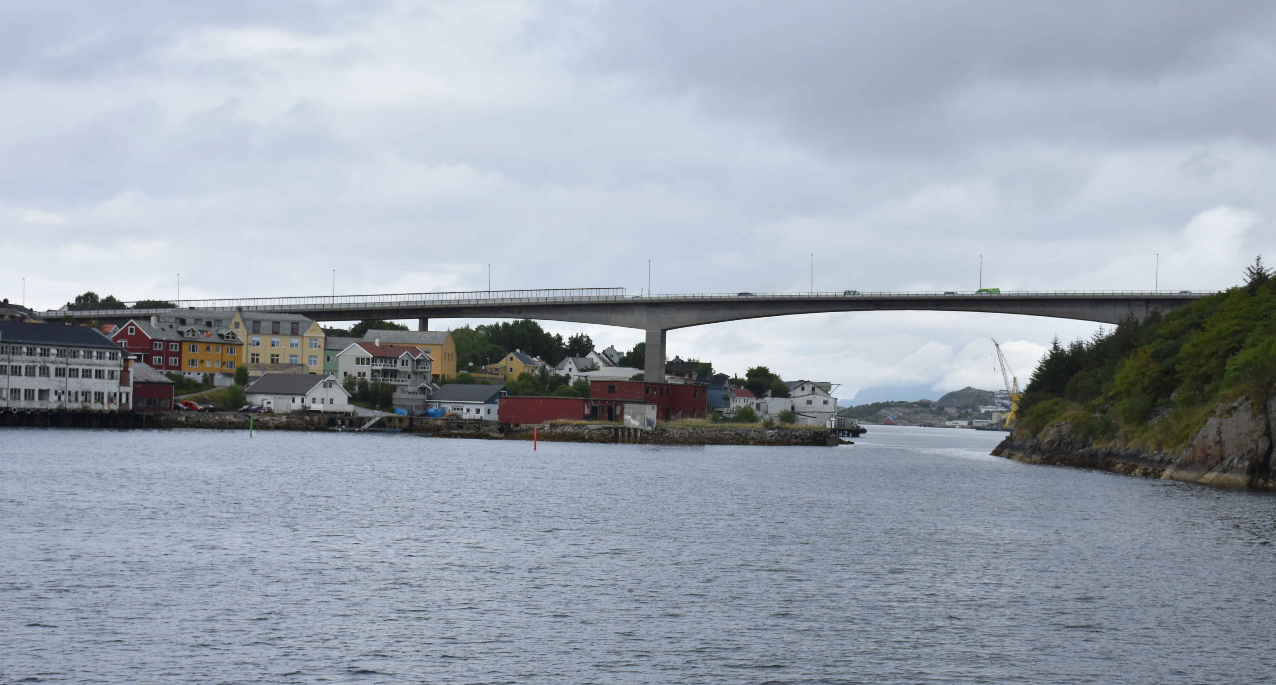 Nordsundbrua med Wilhelm Dalls vei (riksvei 70)